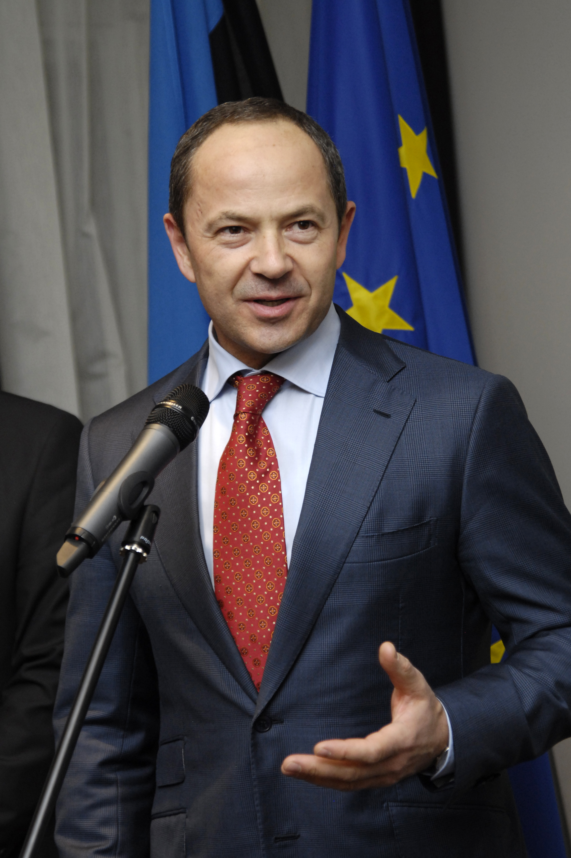 Vice Prime Minister of Ukraine Sergei Tigipko